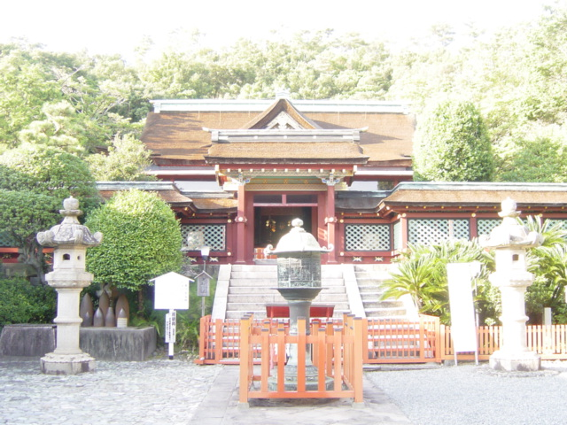 紀州東照宮本殿・唐門